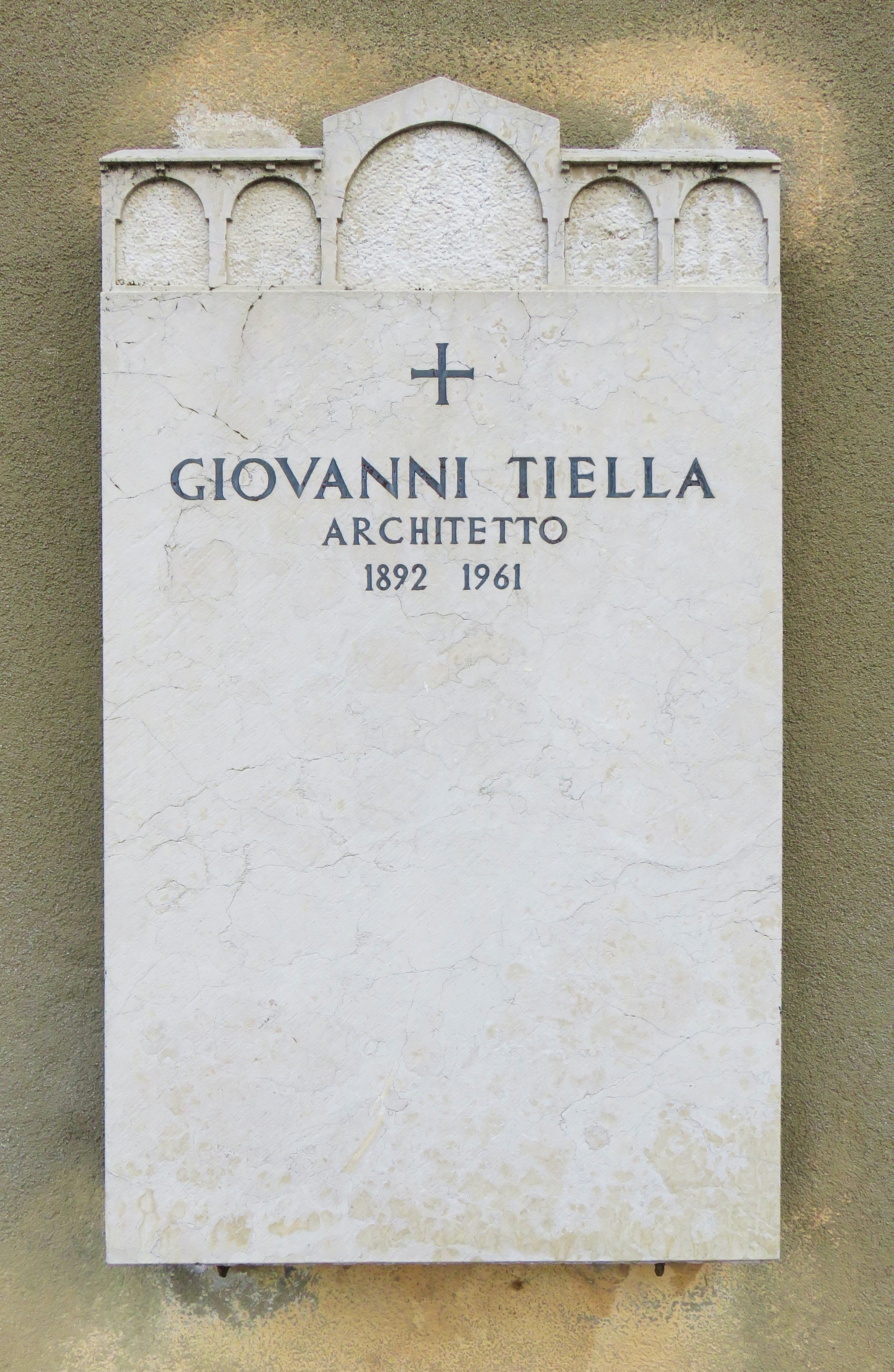 Lapide di Giovanni Tiella, posta sulla parte posteriore della chiesa di Santa Croce, accanto al campanile dentro l'area del Cimitero di Santa Maria. Rovereto